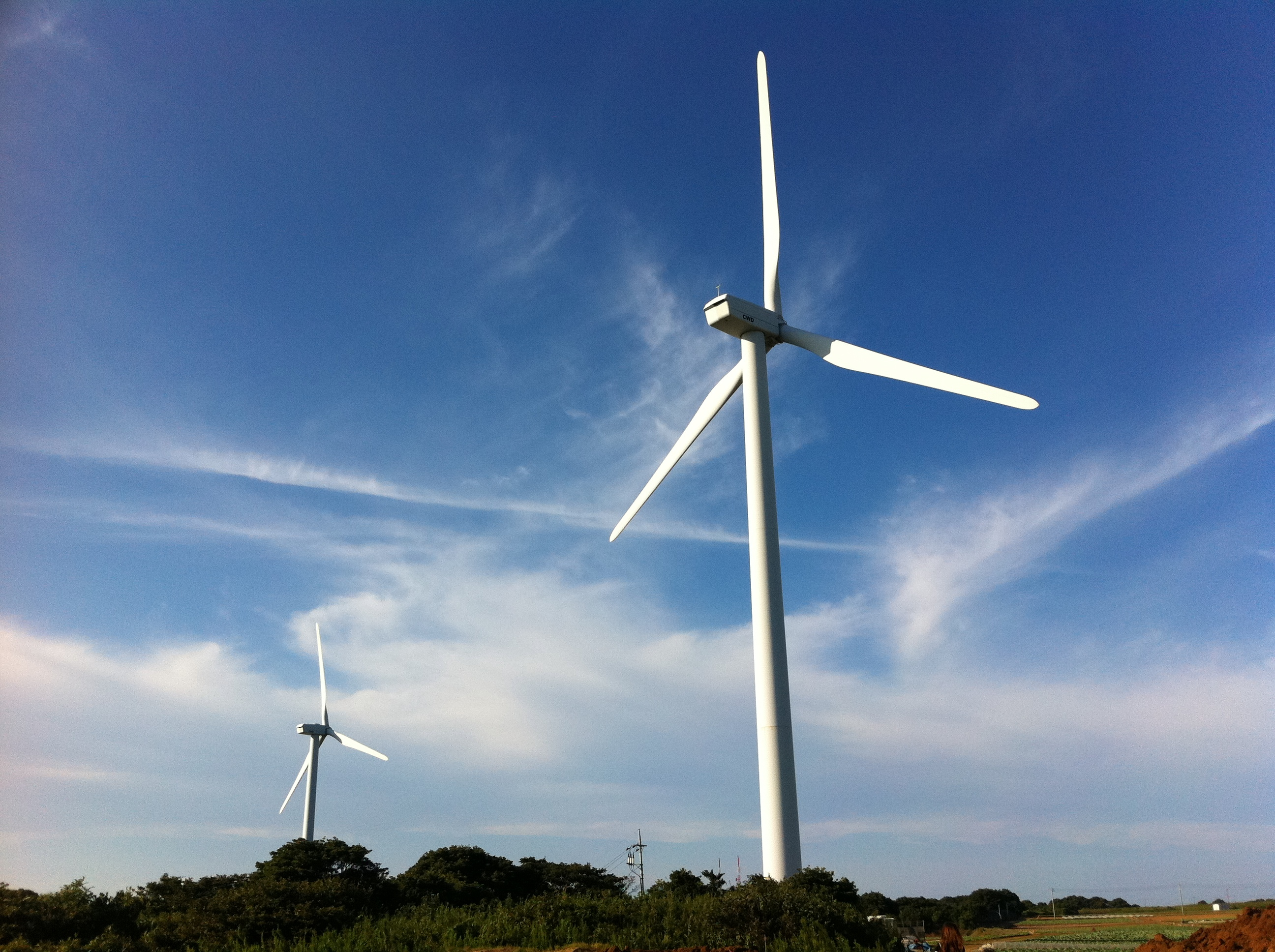 銚子の風力発電